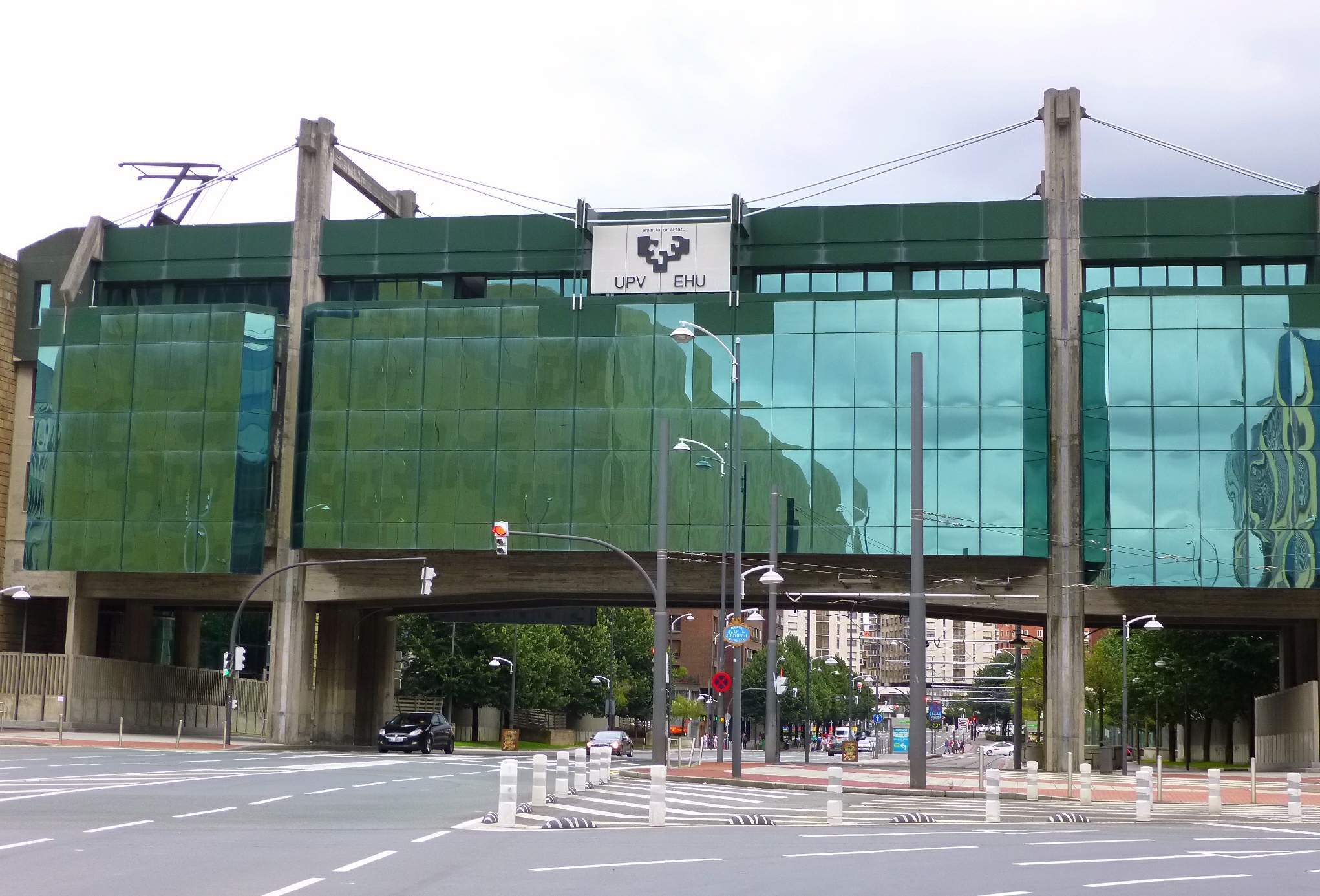 Escuela Técnica Superior de Ingeniería de Bilbao (ETSIB, UPV-EHU), Edificio F